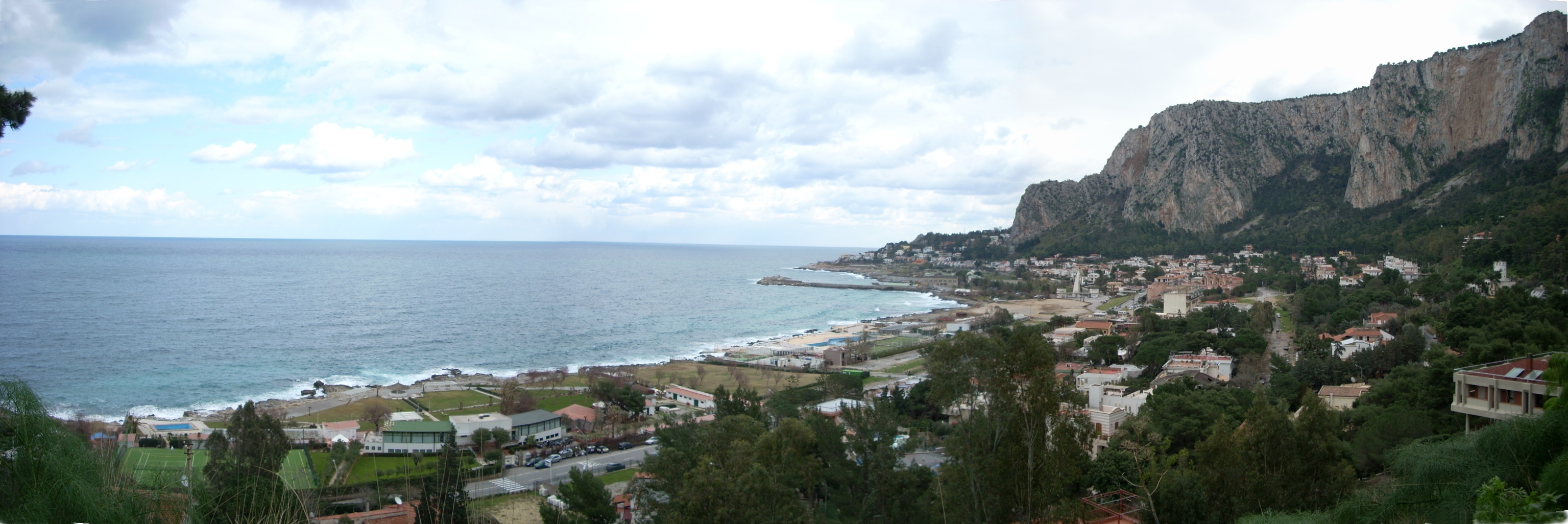 Veduta dell'Addaura